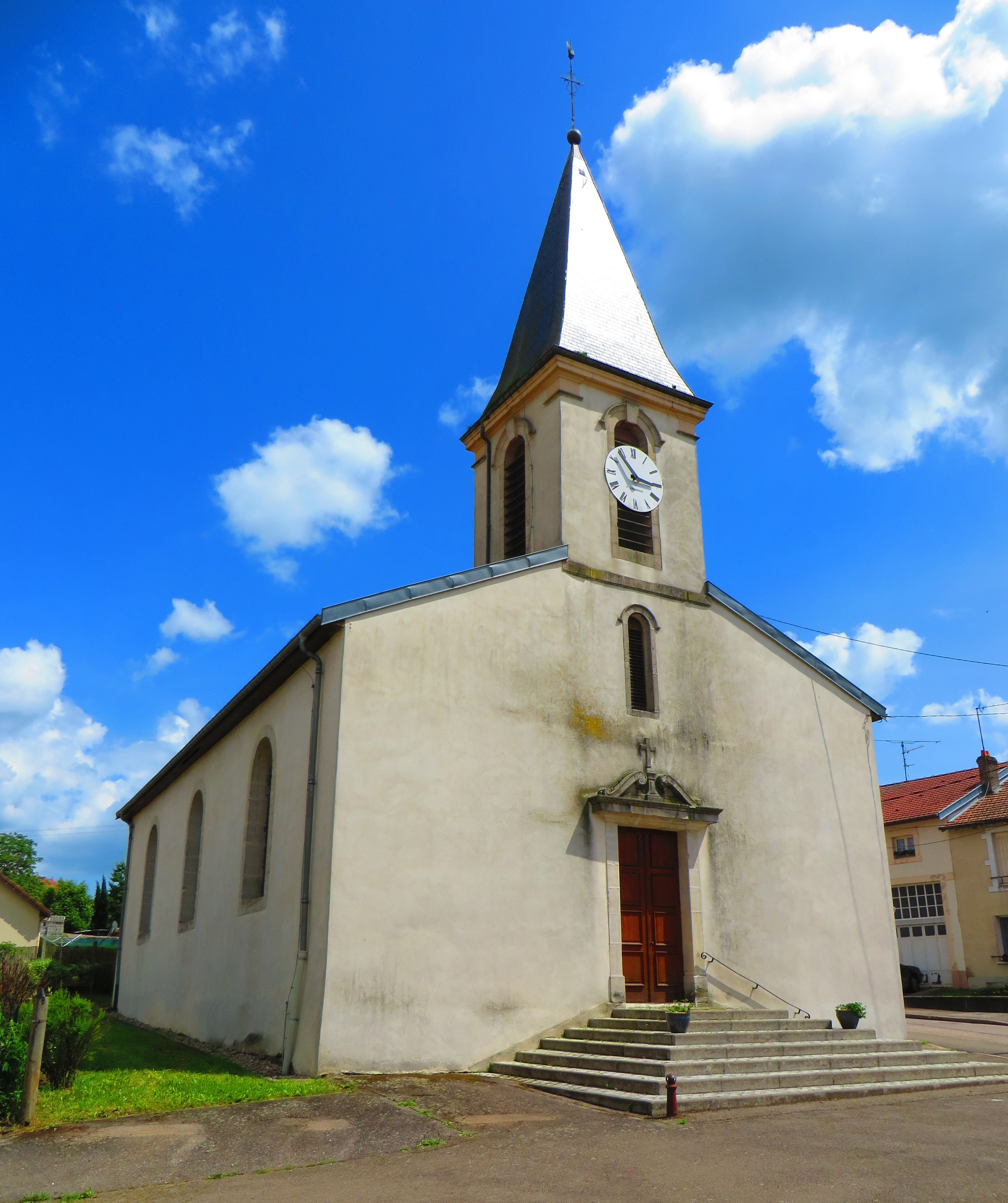 Mazerulles Église de la Sainte-Croix